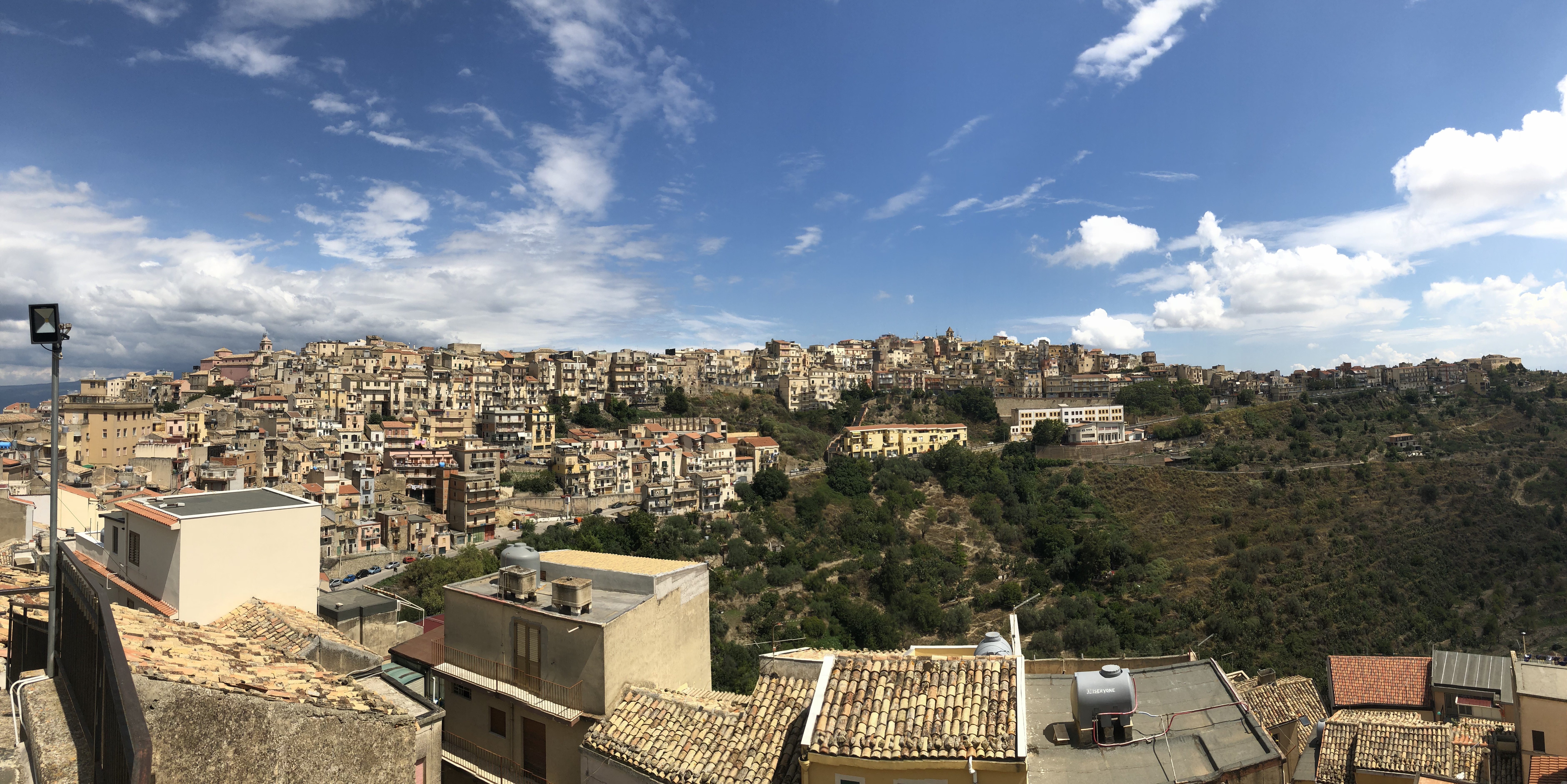 Panorama di Centuripe dal colle dell'Annunziata